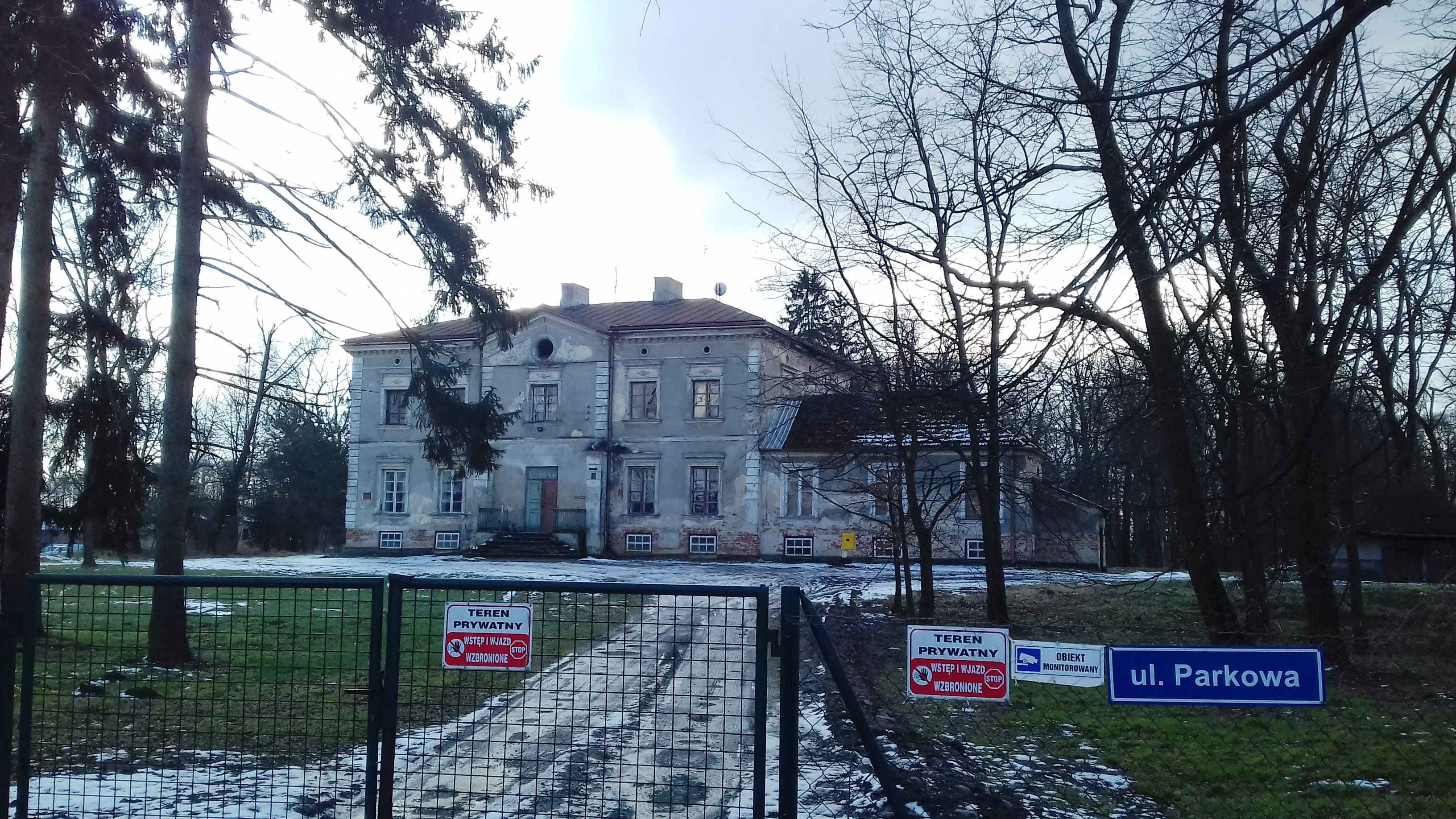 Jasieniec (gm. Jasieniec, pow. Grójec) - pałac